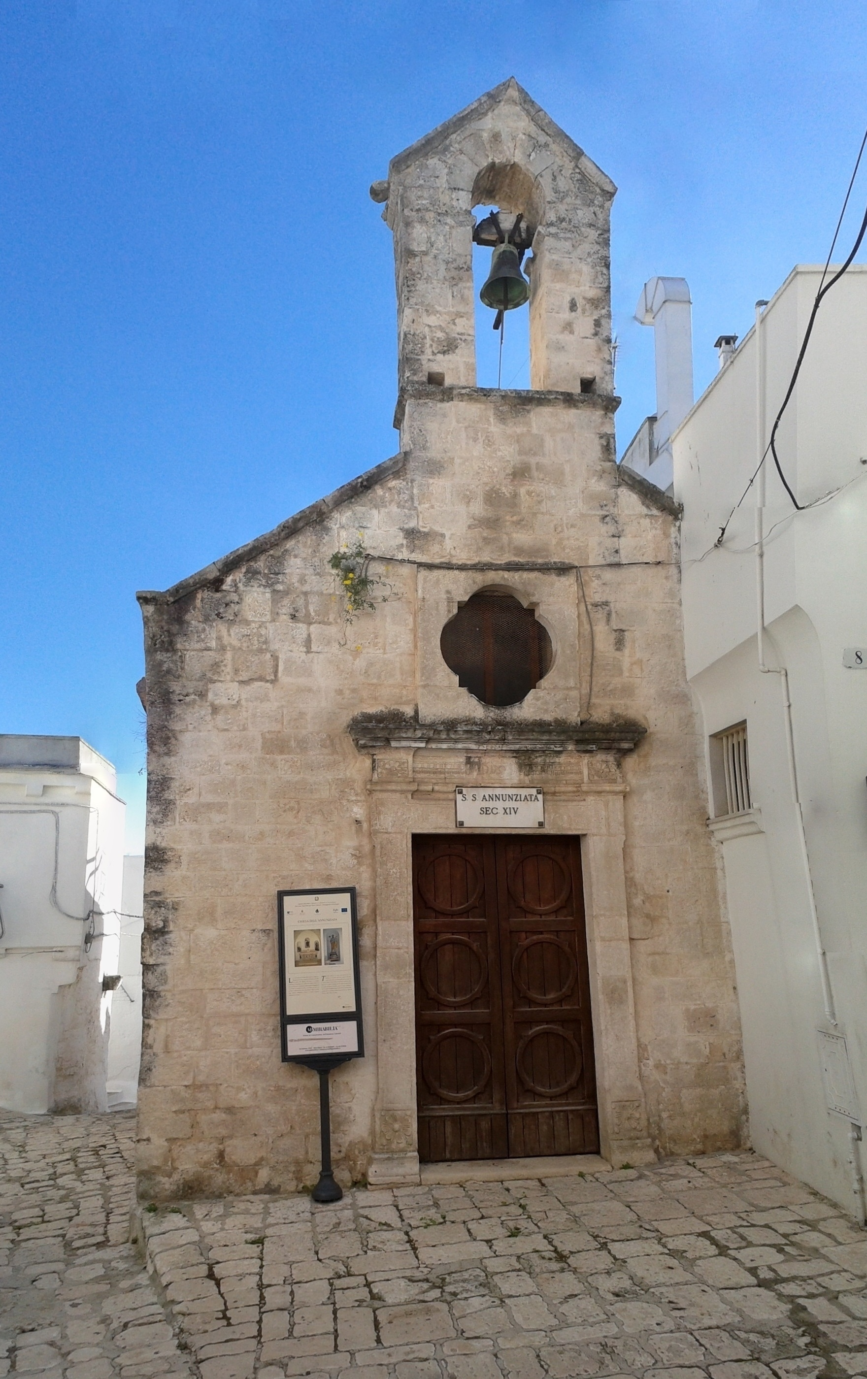 chiesa in stile gotico del XIV secolo, si trova nel centro storico nell'omonima via nei pressi della piazza vecchia. La facciata della chiesa è sormontata da un campanile a vela, l'interno è ad un'unica navata.